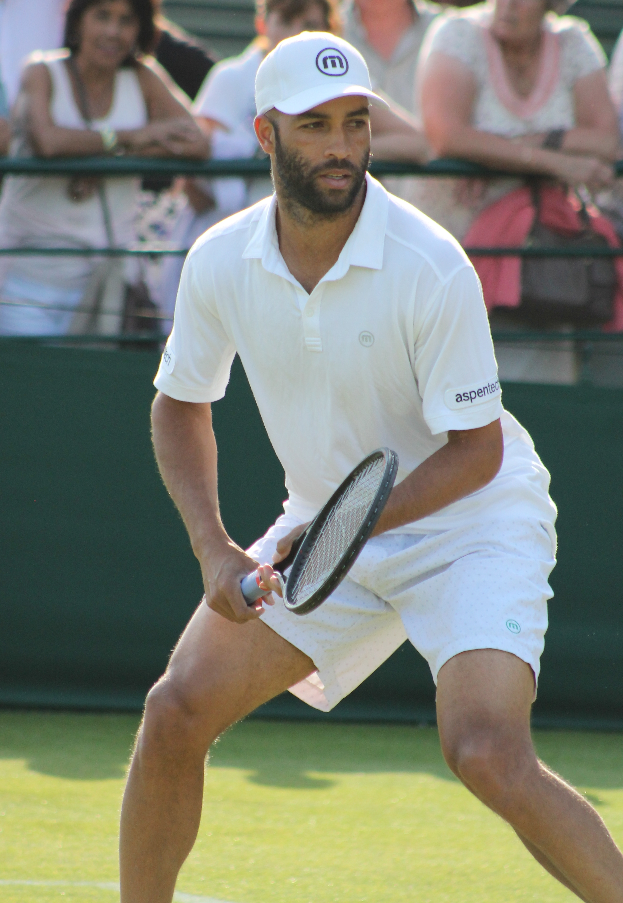 Blake WM13-008